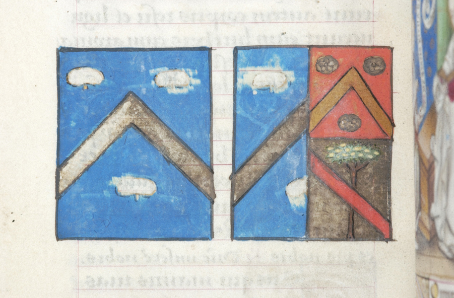 Missel Manuscrit 646. fol 21v détail